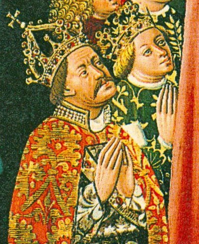 König Albrecht II. und seine Frau Elisabeth Ausschnitt aus dem Albrechtsaltar im Stift Klosterneuburg